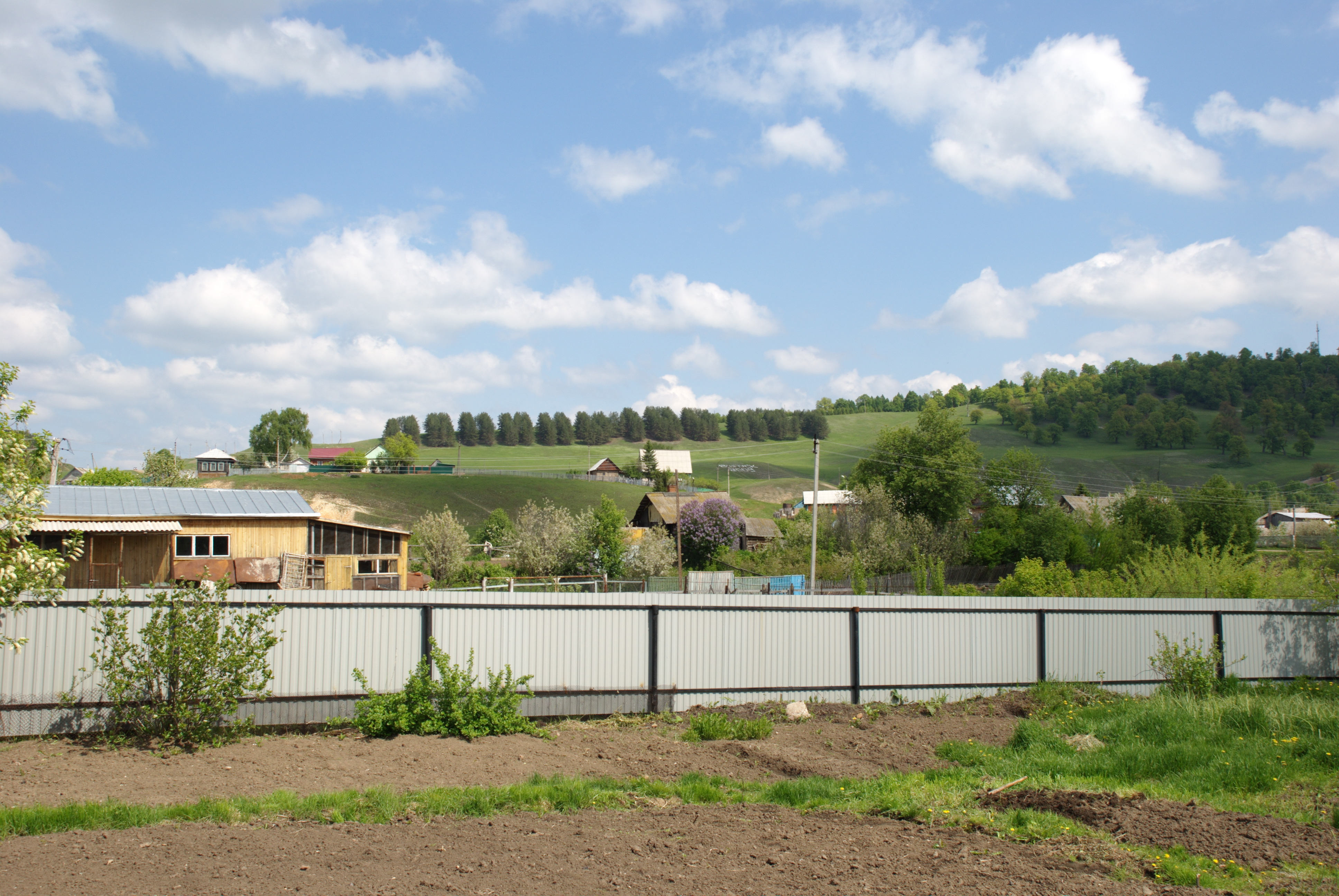 Вид на гору с лесопосадкой "Ленину 100 лет"